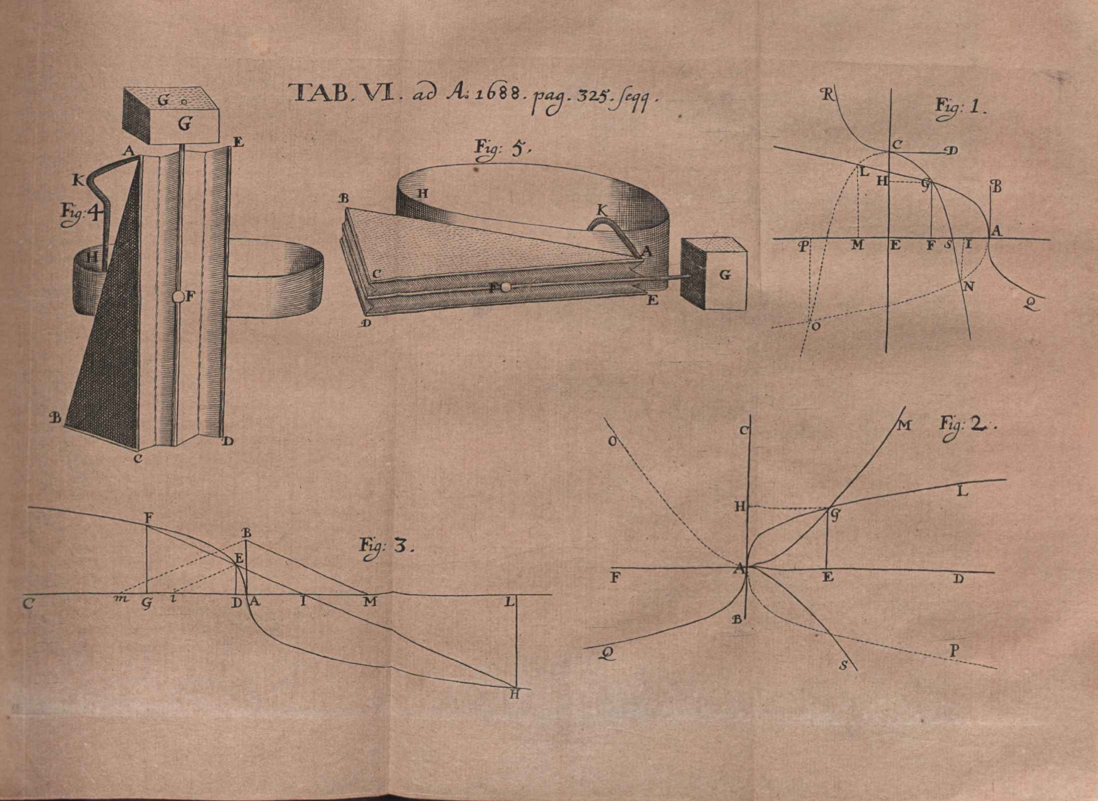 Illustration